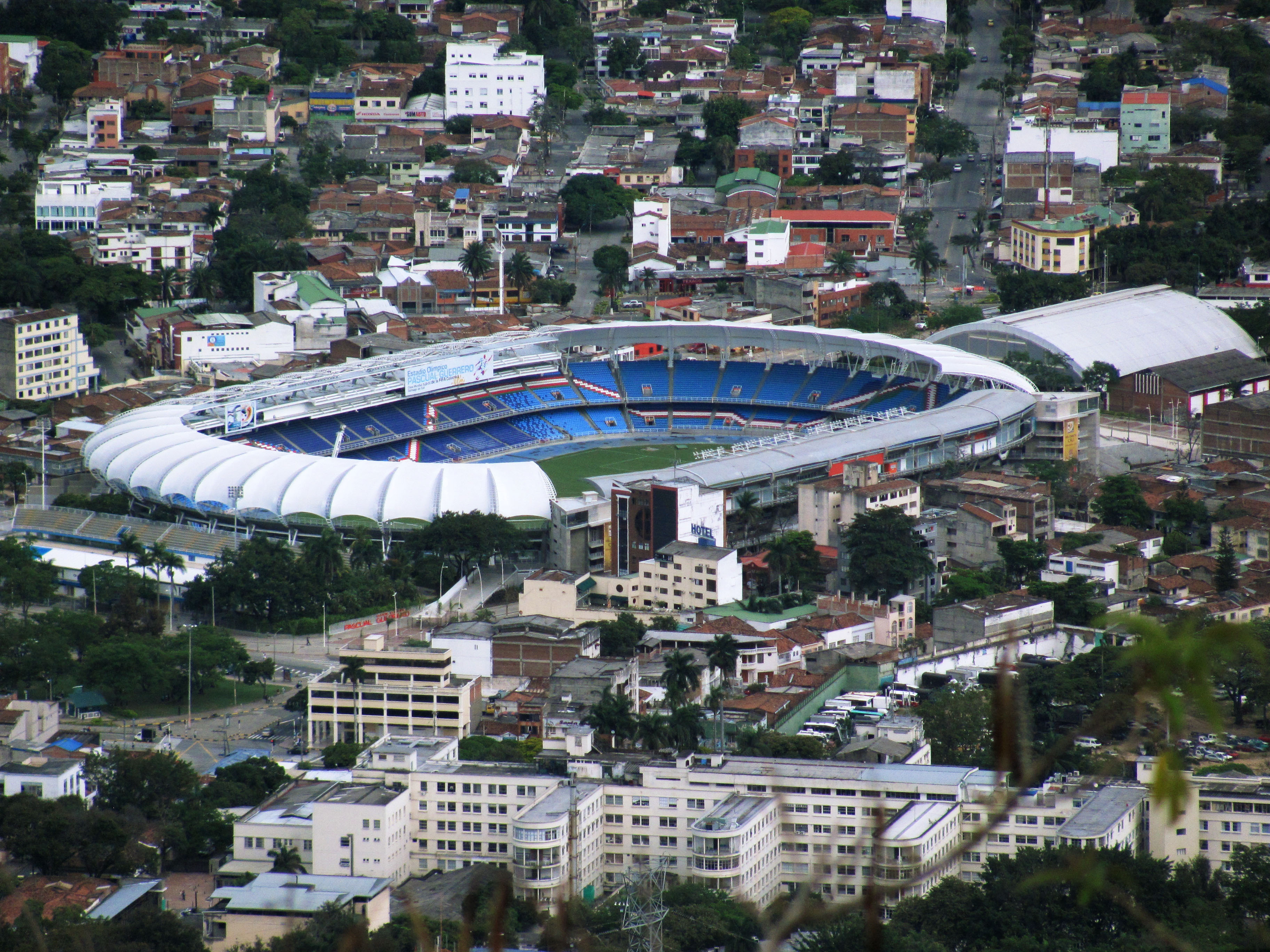 Vista del Estadio Olímpico Pascual Guerrero desde el Cerro de Cristo Rey.